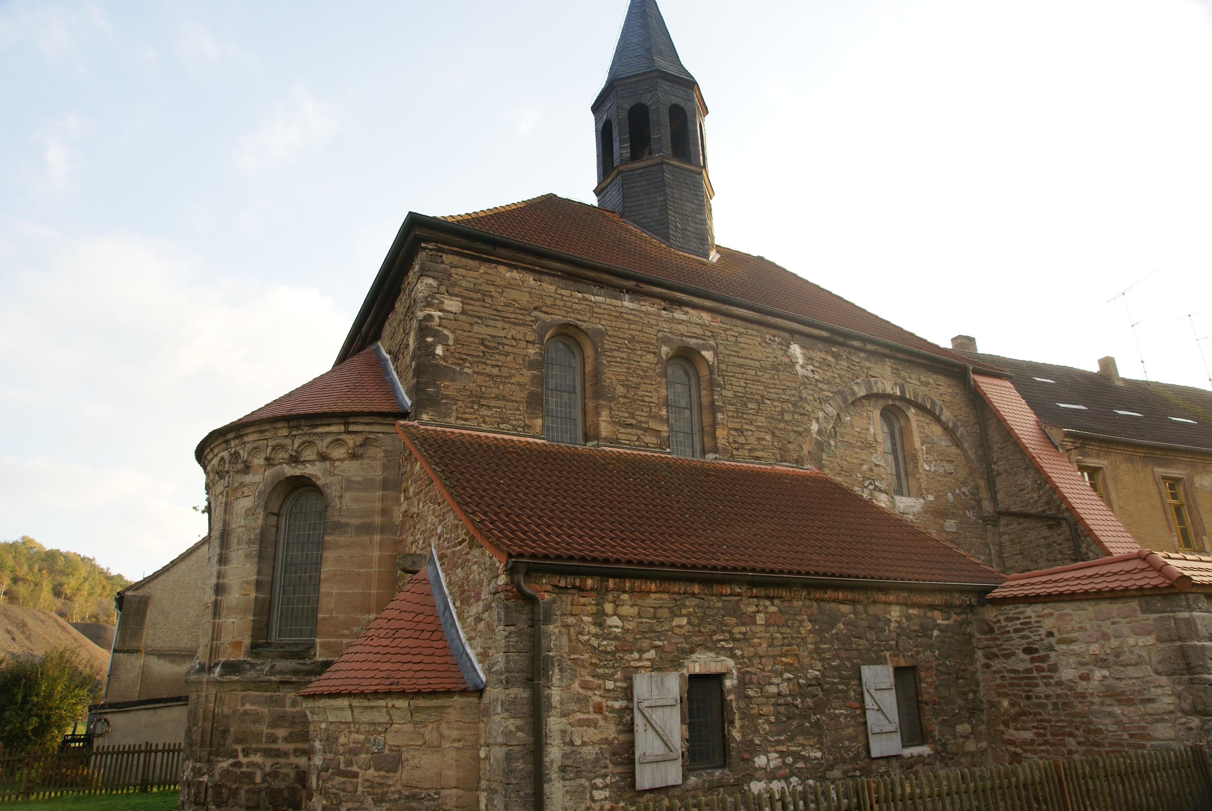 Die heutige Kirche St.Cyracus an der Stelle des Klosters Wimmelburg. Die alte Kirche war viel größer, brannte aber 1680 teilweise ab.